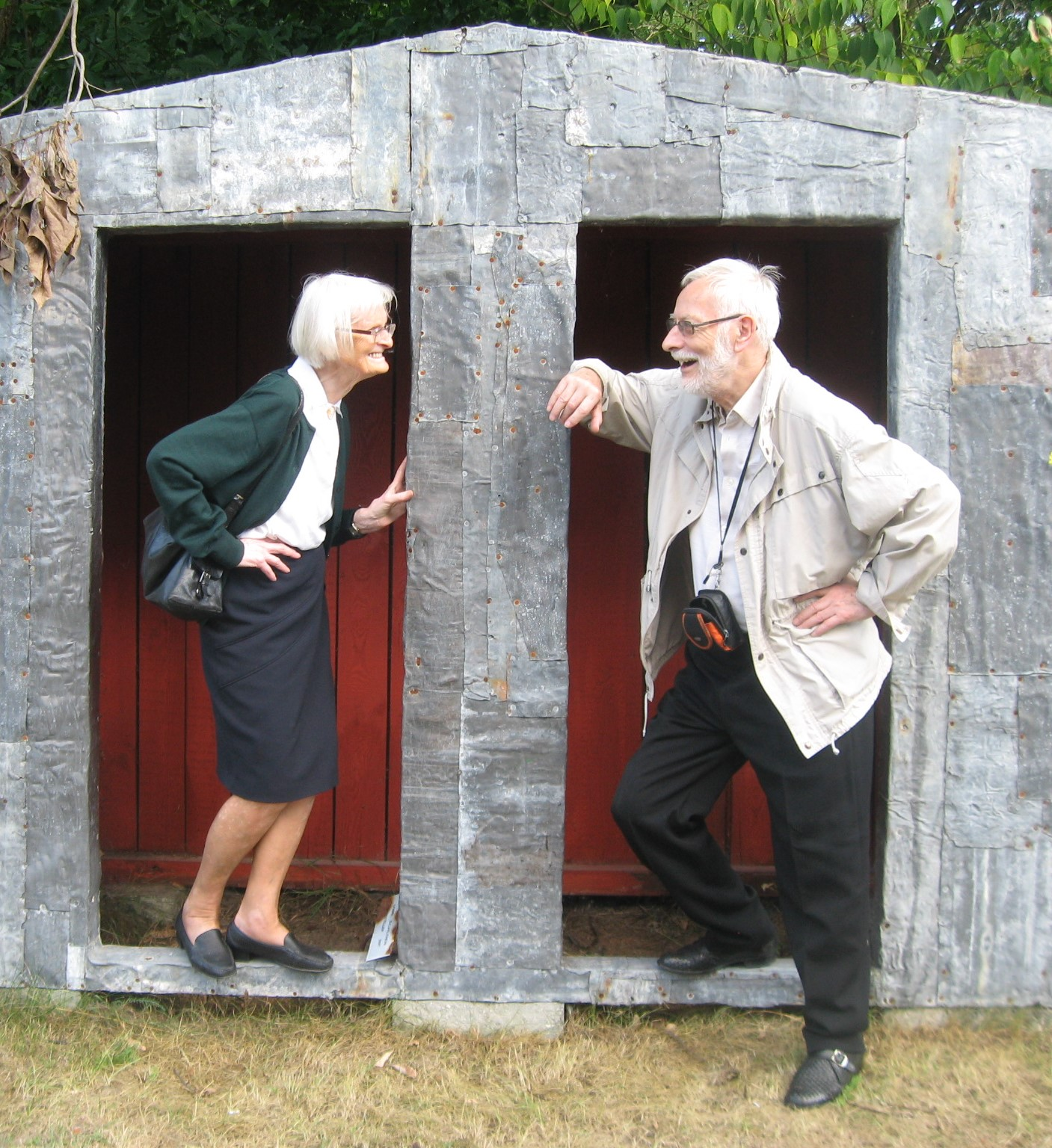 2013 Orońsko